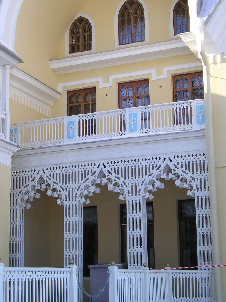 Alexandria park. Cottage.